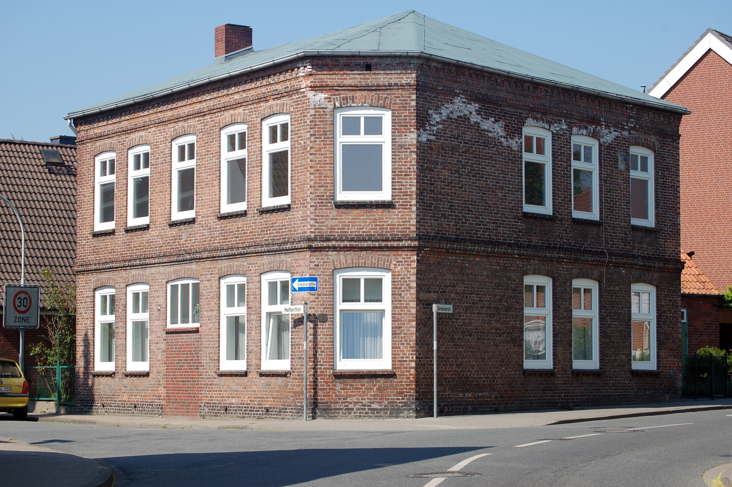 das historische Backsteinhaus an der Ecke Meßtorffstraße, Seminarstraße in Uetersen. Oben rechts sind große Salpeterausblühungen zu sehen.